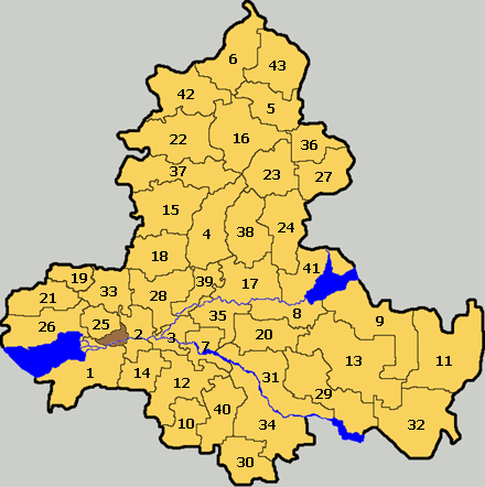 Raiones del óblast de Rostov, en Russia